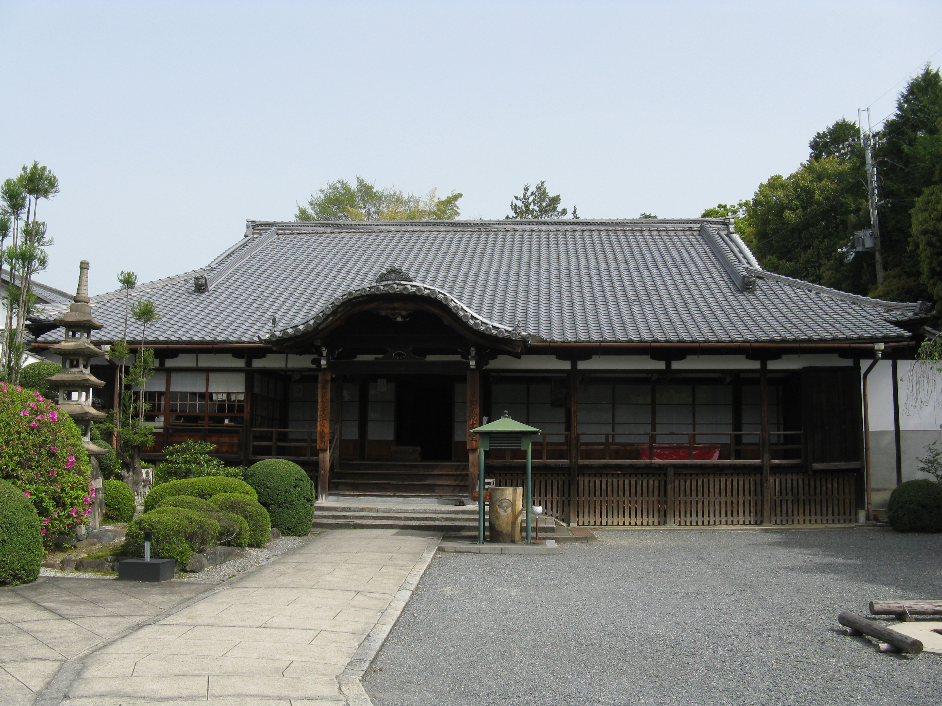 即成院 本堂